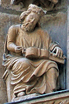 Organistrum. Pórtico del Sarmental, catedral de Burgos (España) siglo XIII.